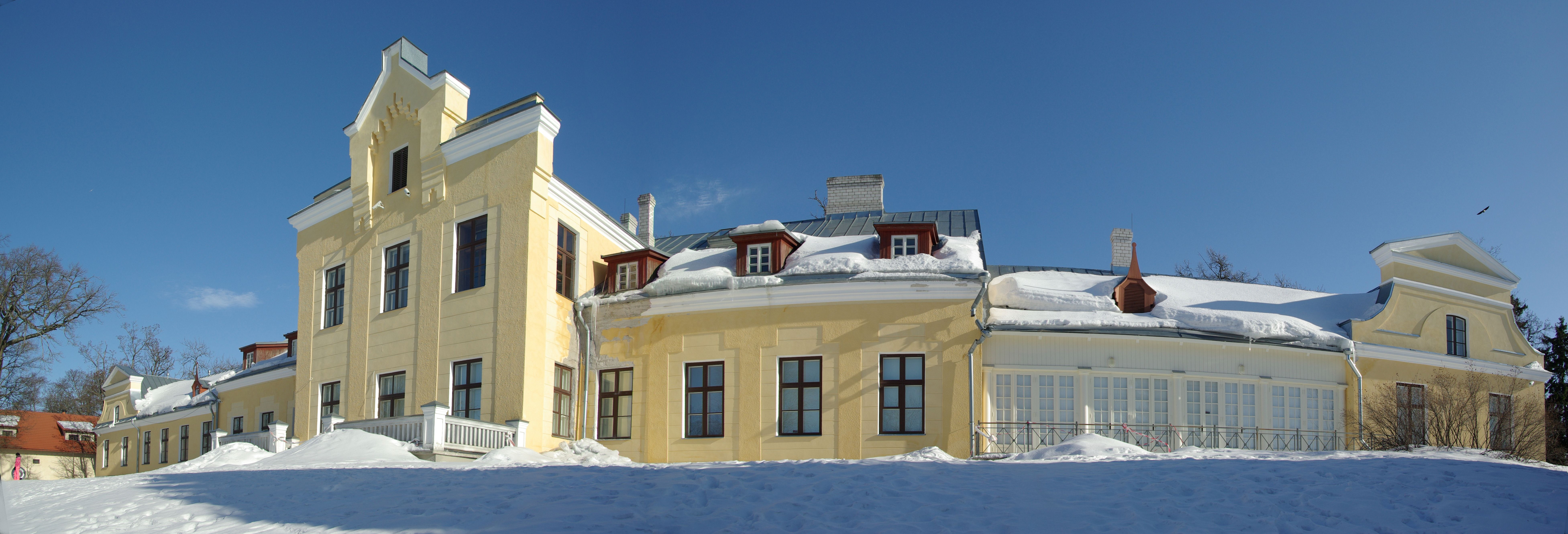 Harju maakond, Viimsi vald, Viimsi alevik